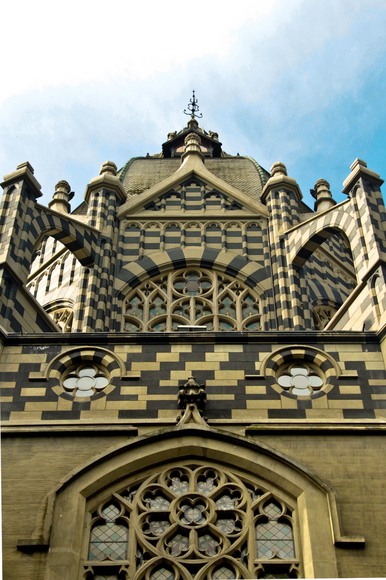 Vista detallada del estilo arquitectónico y estética de la geometría.